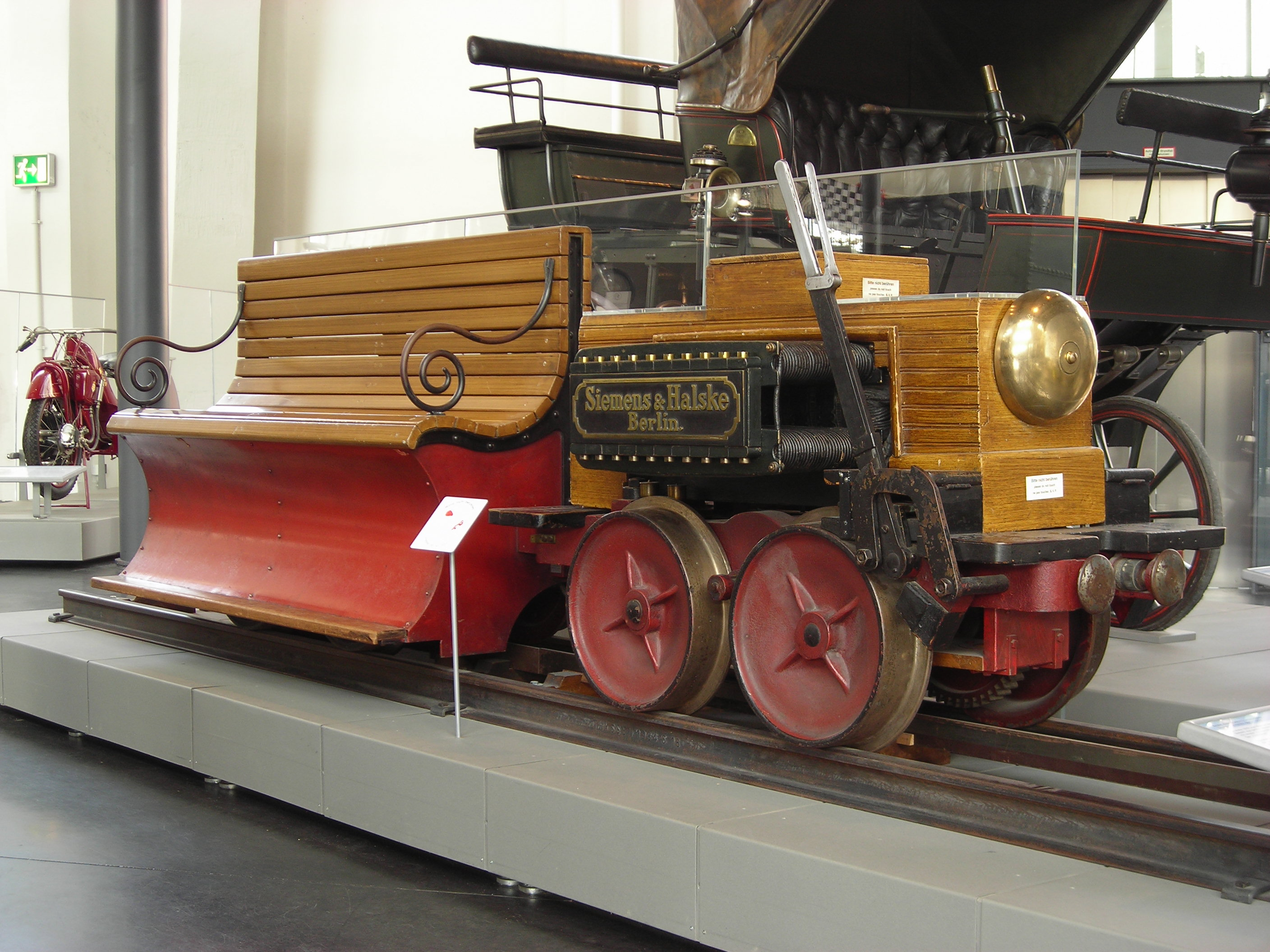 Erste Elektrolokomotive von Werner Siemens, Wernerwerk, Berlin (gebaut als Demonstrationsobjekt für die Berliner Gewerbeausstellung) — Exponat im Deutschen Museum Verkehrszentrum München, Inv.-Nr. 3720. Stifter: Siemens & Halske AG, Berlin Technische Daten: Gleichstrom 150 V Leistungsaufnahme: 2,2 kW Höchstgeschwindigkeit: 7 km/h Masse: 954 kg Zugkraft: 75 kN